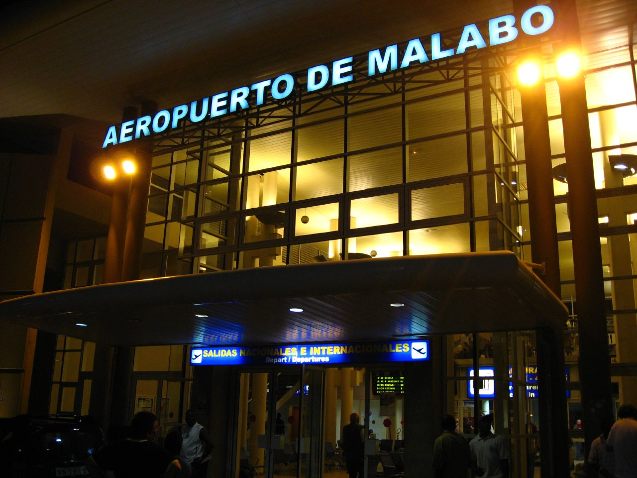 aeropuerto de malabo al anochecer.